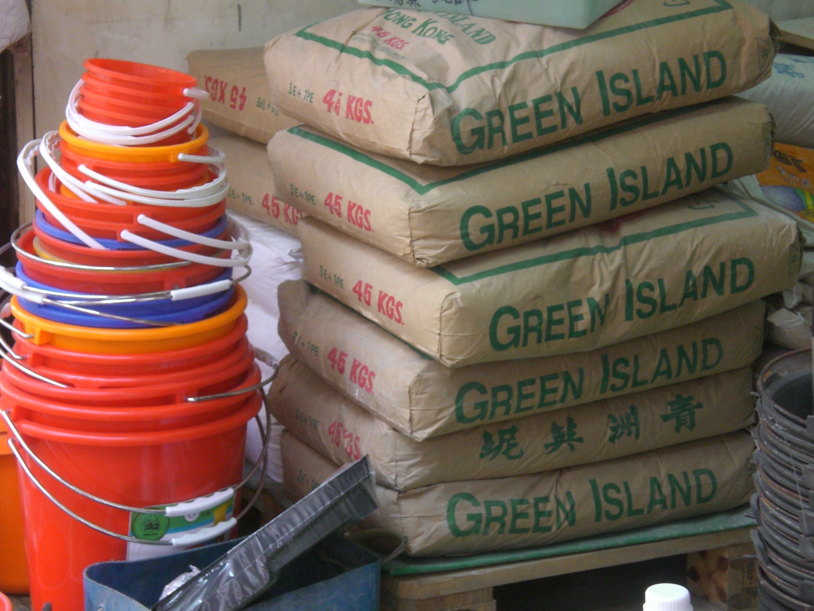 中文（香港）: 西環德輔道西zh:三行建築泥水物料zh:供應商, Bucket膠水桶及青洲英泥